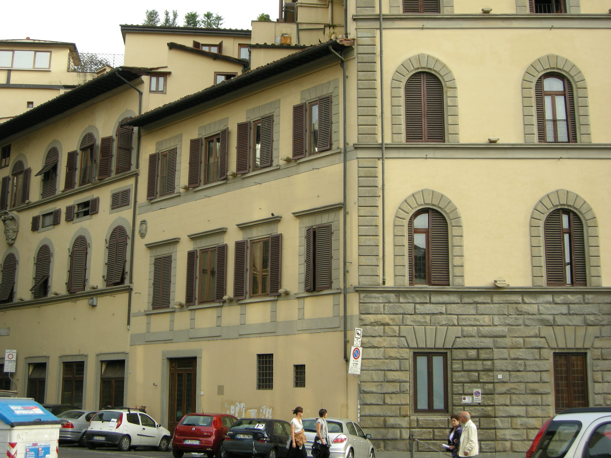 Zona dell'ex-Teatro della Piazza vecchia